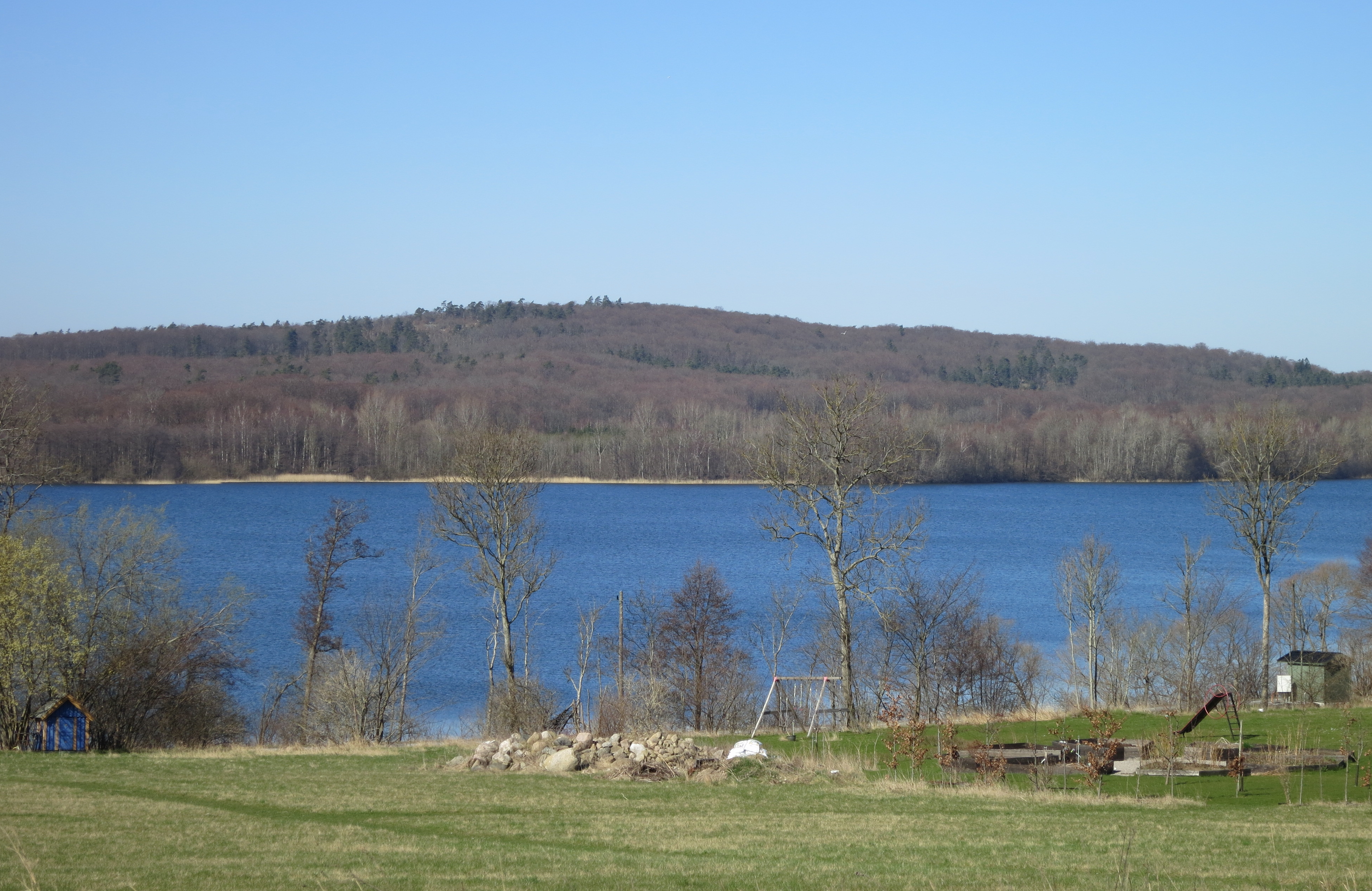 Balsberget, mars 2014